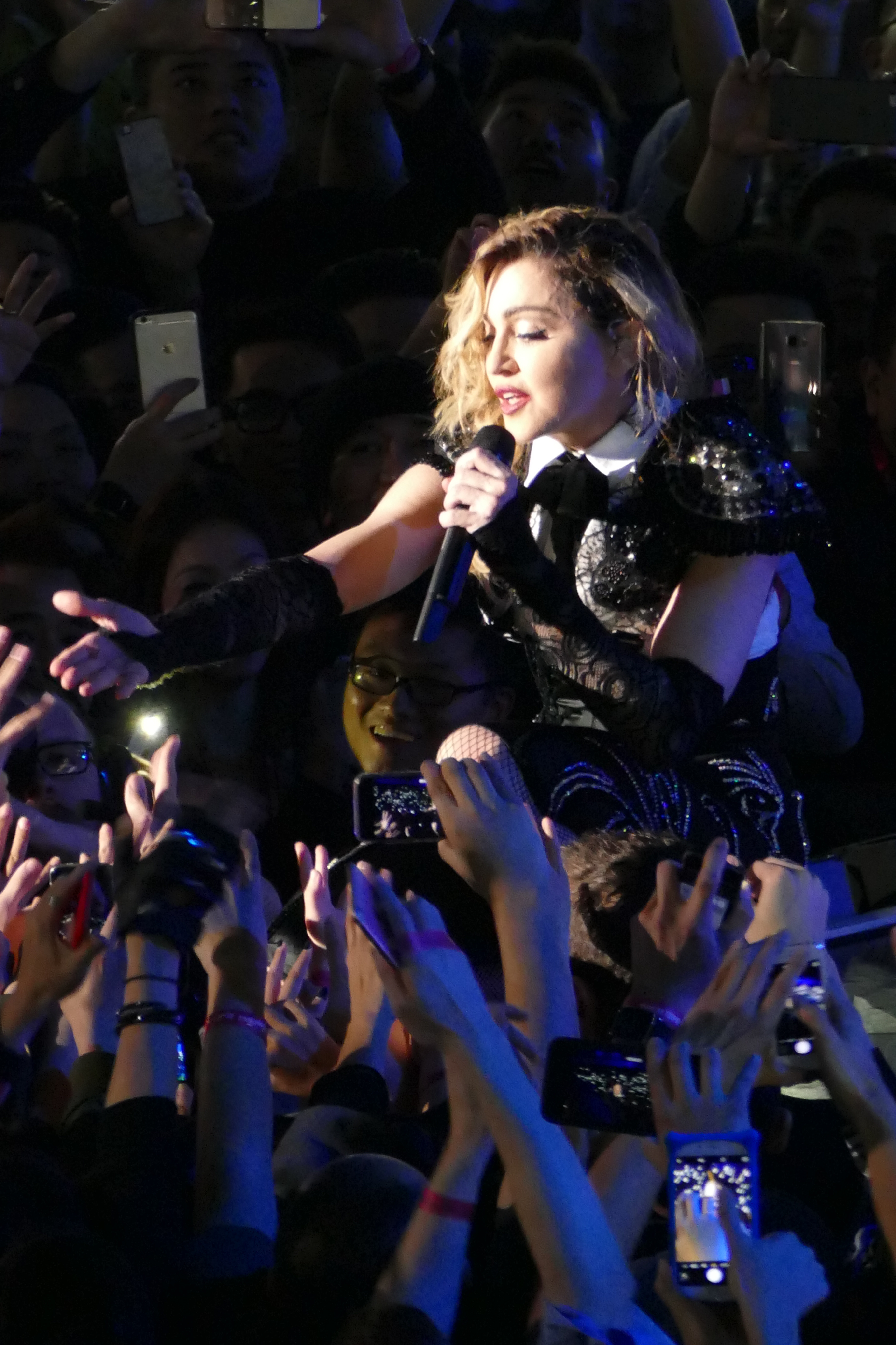 taipei_madonna_concert-251